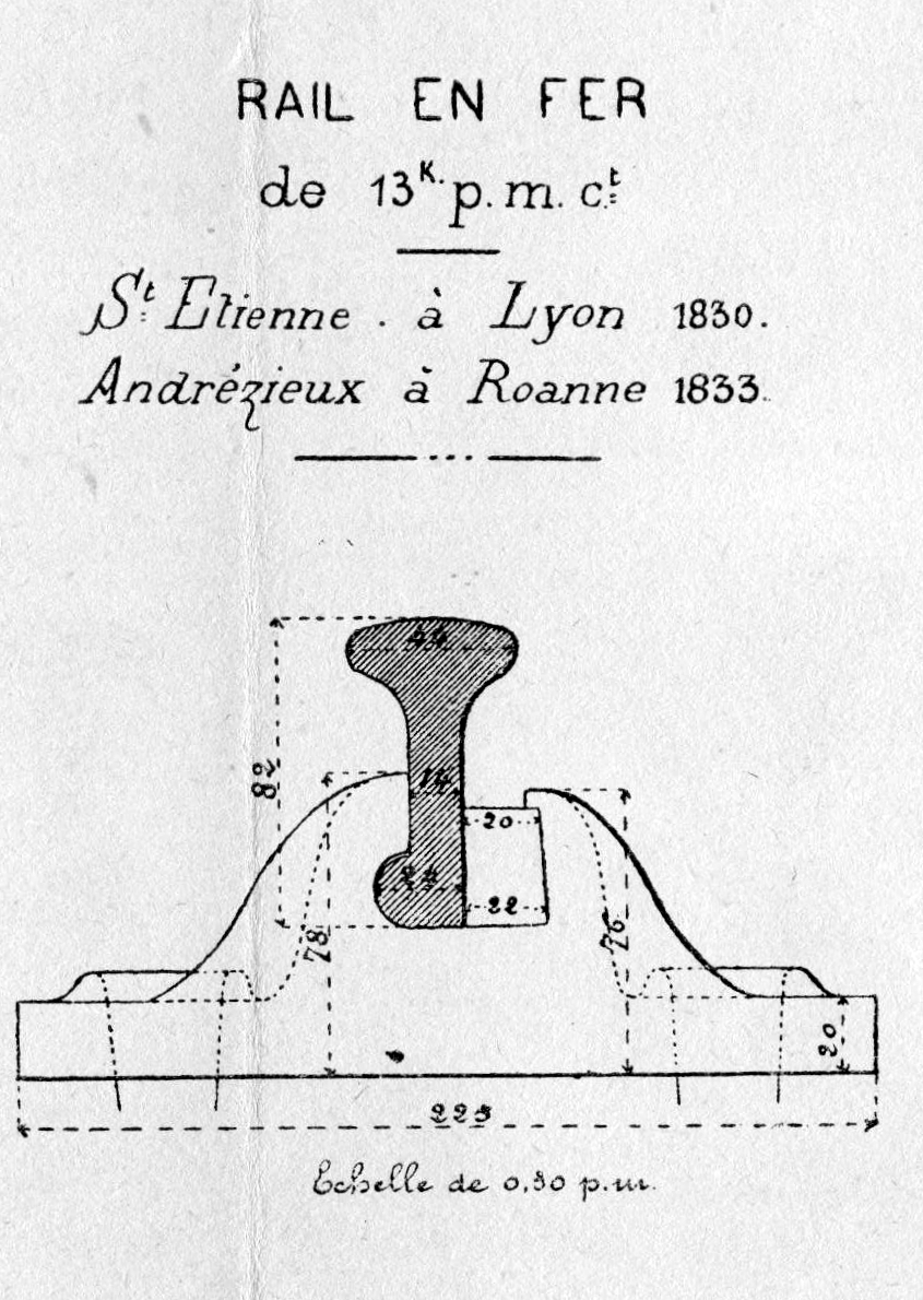 schéma